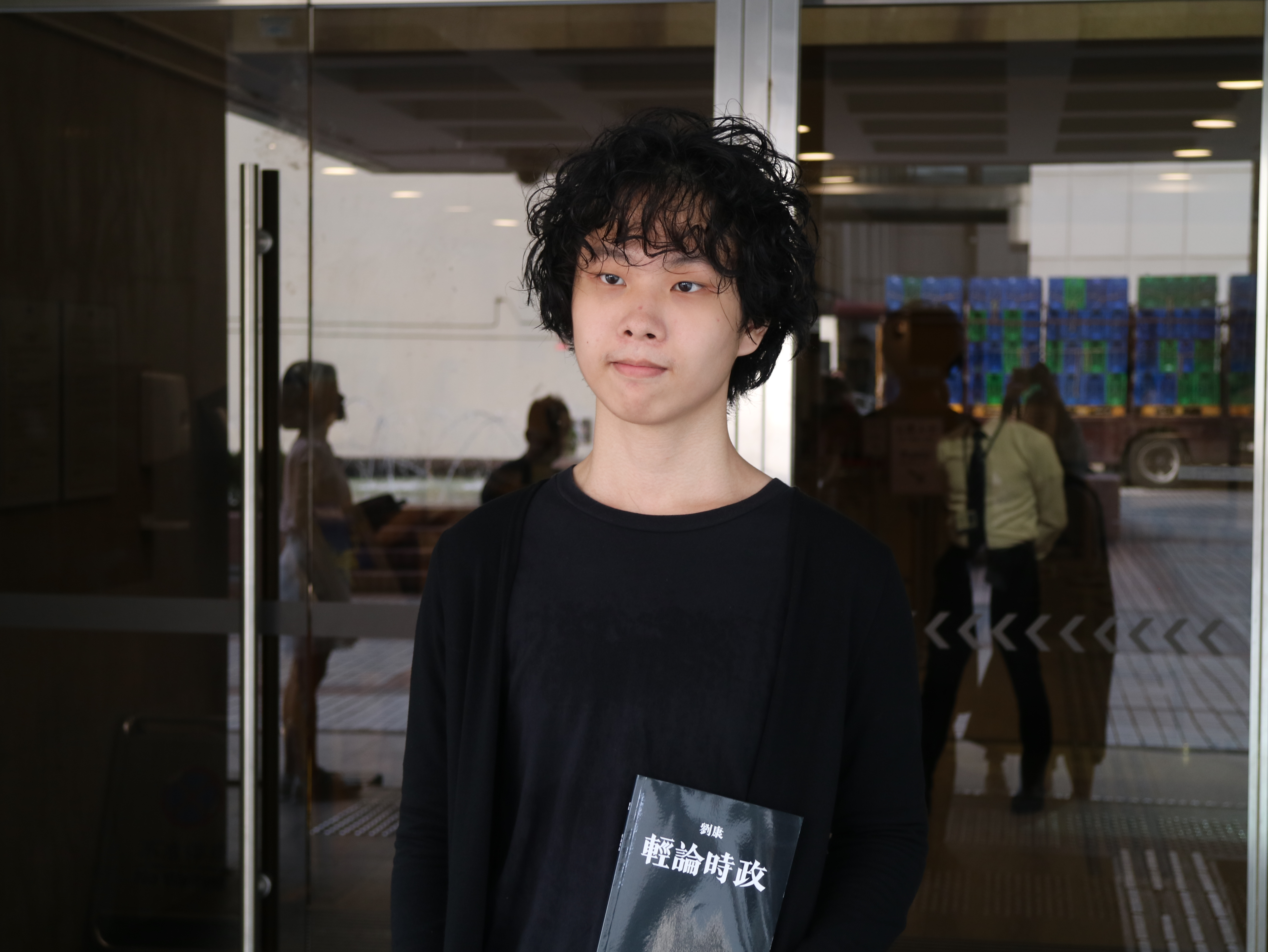 2019年8月28日，劉康攜帶《輕論時政》身處金鐘高等法院門口。